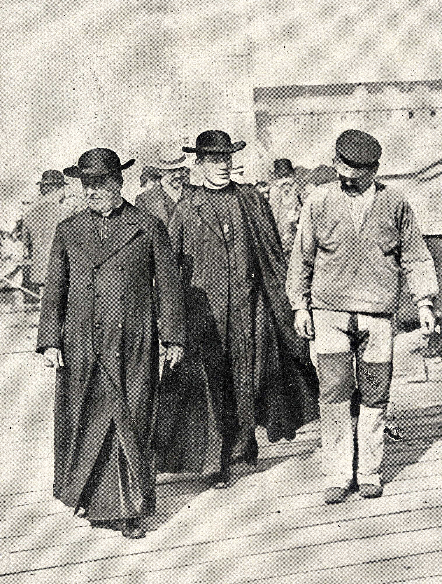 Arcebispo do Pará D António Marcondio Homem de Mello e secretário à chegada a Lisboa no vapor Thames, após o naufrágio do Sirio.